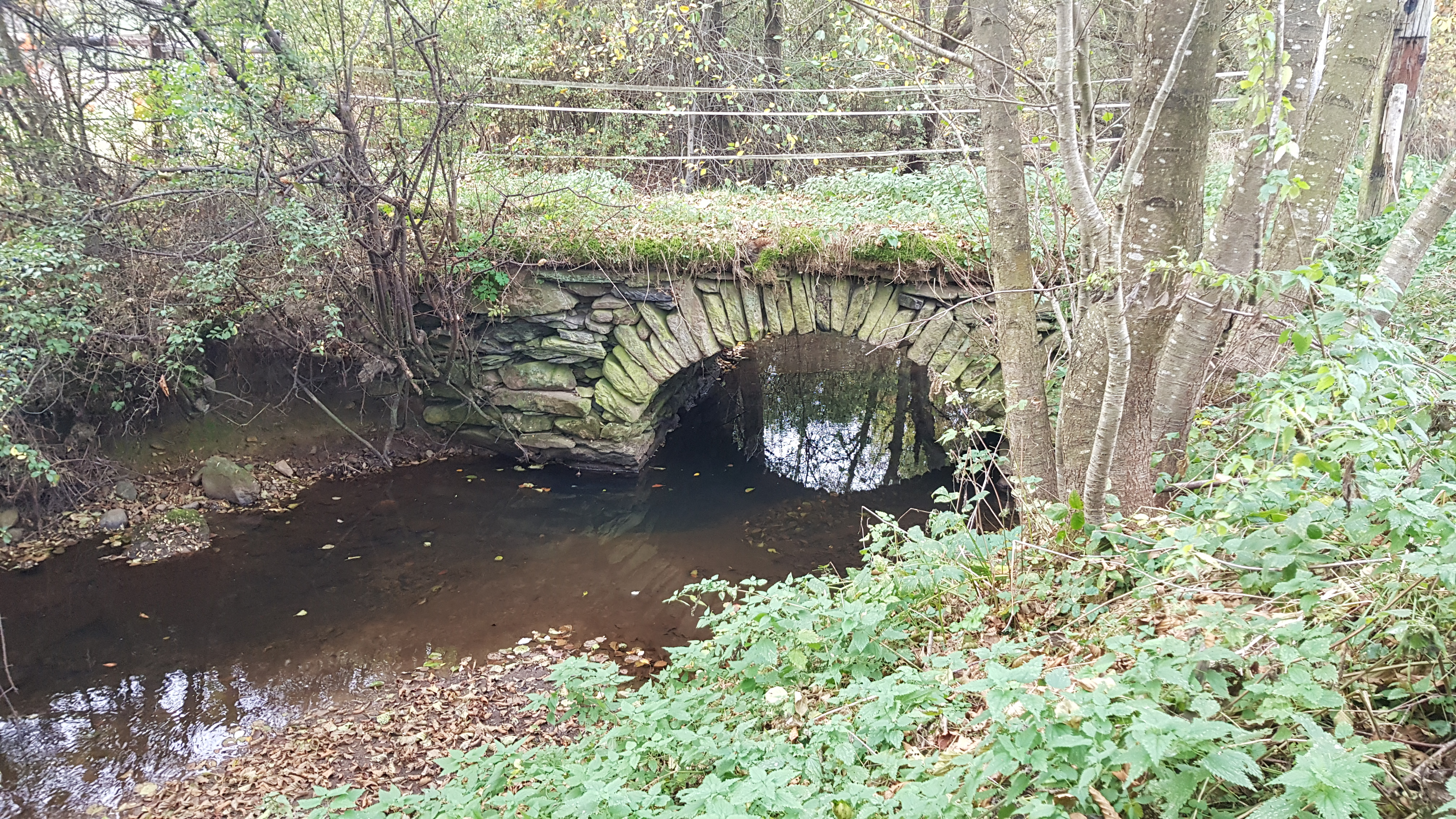 Schafsbrücke bei Am Büchel, Recht, Sankt Vith, Belgien This photo of immovable heritage has been taken in the Walloon Region